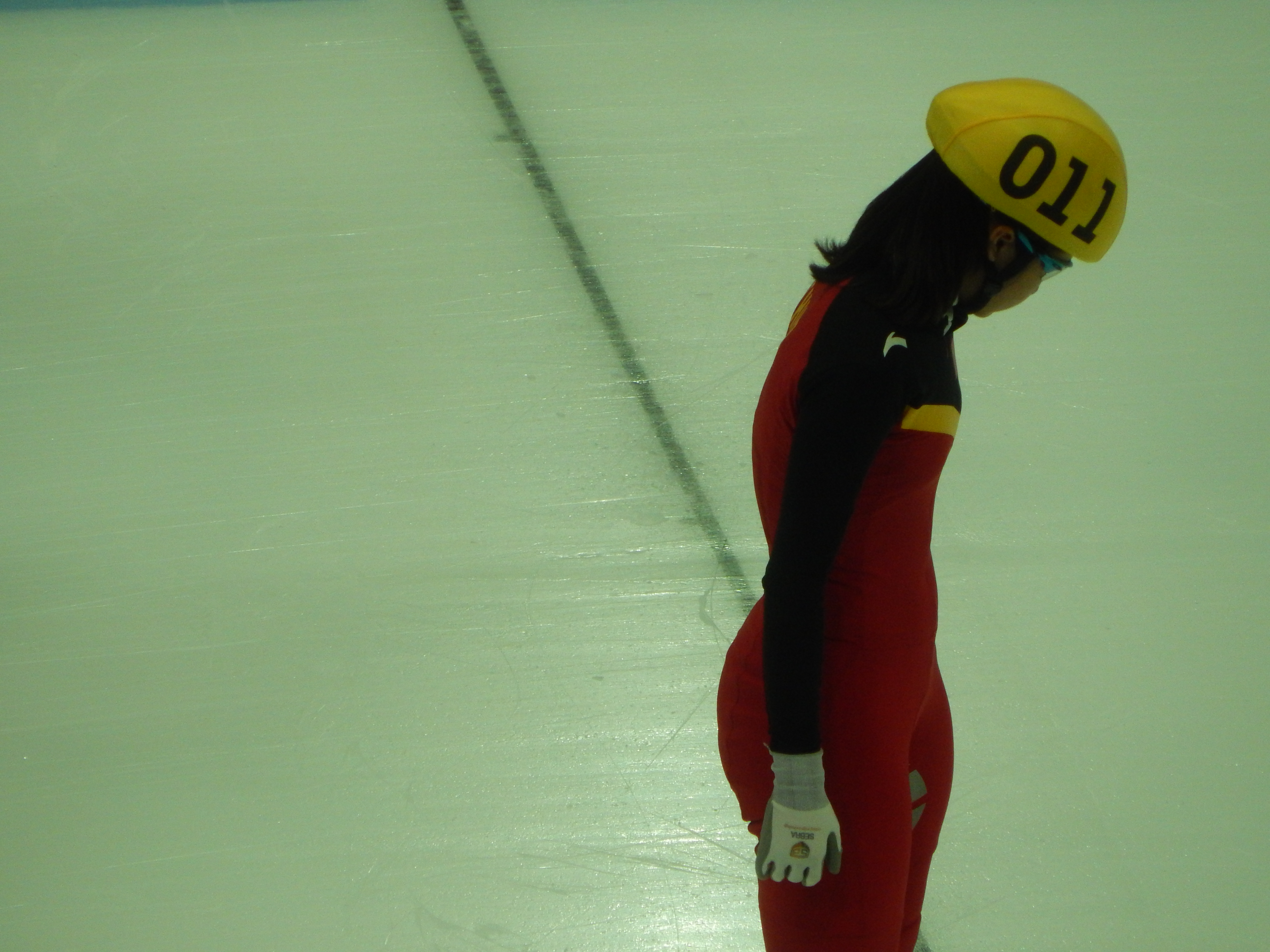 Чемпионат мира по шорт-треку 2015 в Москве Квалификационный раунд, 5 забег, 1000 м, Женщины